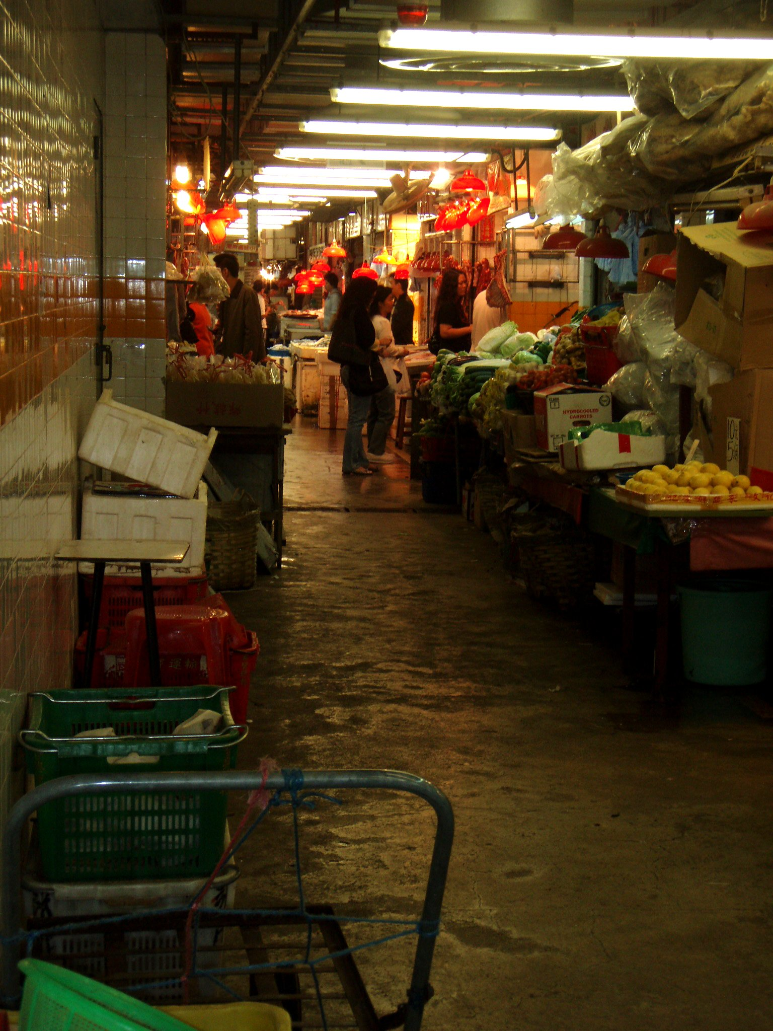 Under 樂富中心.